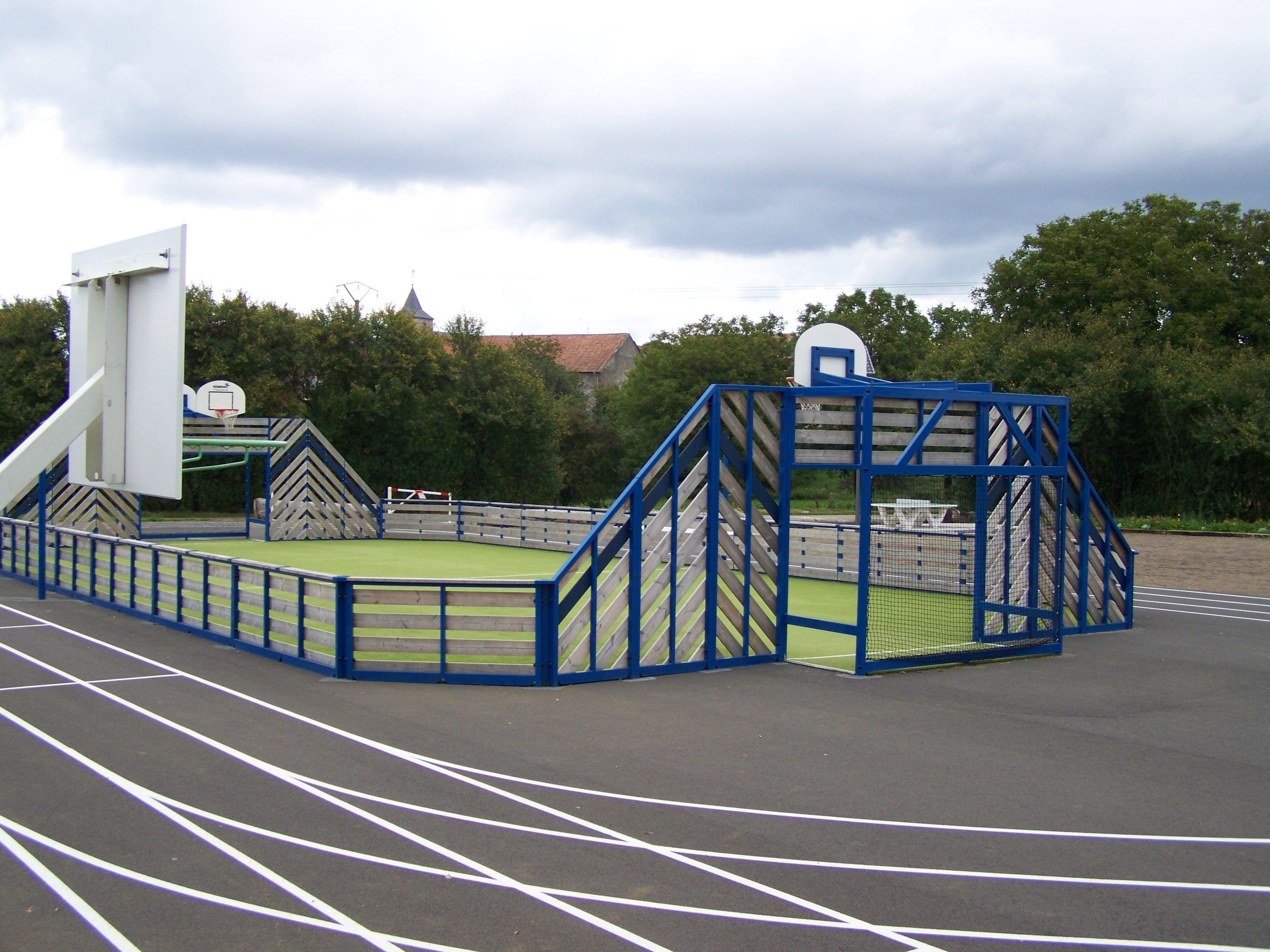 Chenieres City Stade